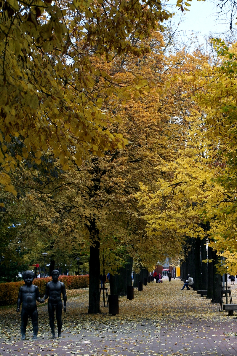 Skulptuur "Isa ja poeg" Küüni tänaval.